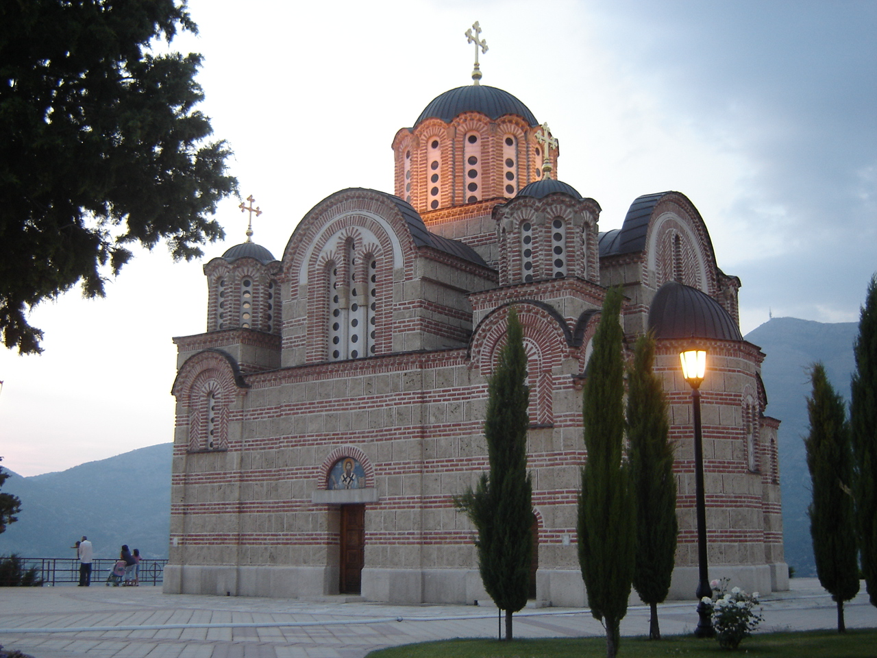 Church in Trebinje